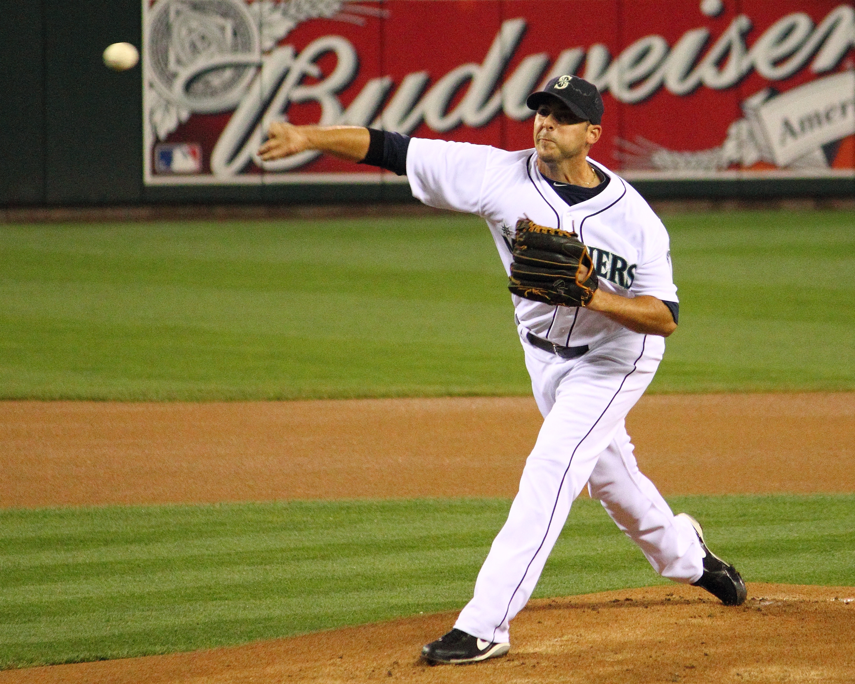 David Pauley